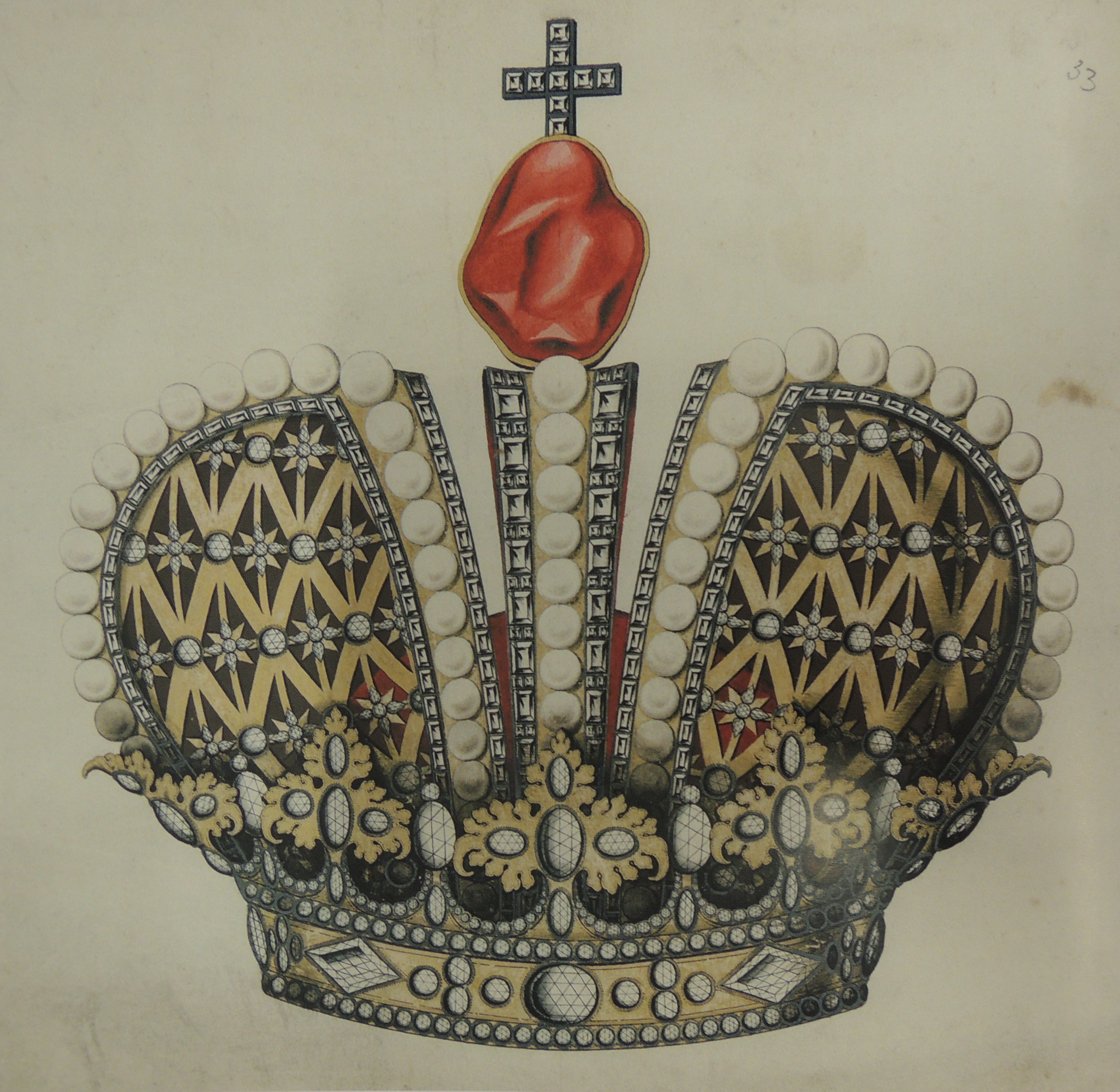 Императорская корона. Подготовительный рисунок Рисунок короны из дела о подготовке коронации императора Петра II. 1727. РГАДА. Рисунок находится в деле "Планы потехам и другие разные" среди эскизов, связанных с организацией торжеств по случаю коронации Петра II. (Выставка "Венчания на царство и коронации в Московском Кремле". С. 184)